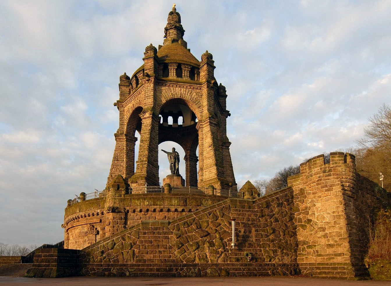 Kaiser-Wilhelm-Denkmal bei Porta Westfalica, Nordrhein-Westfalen.